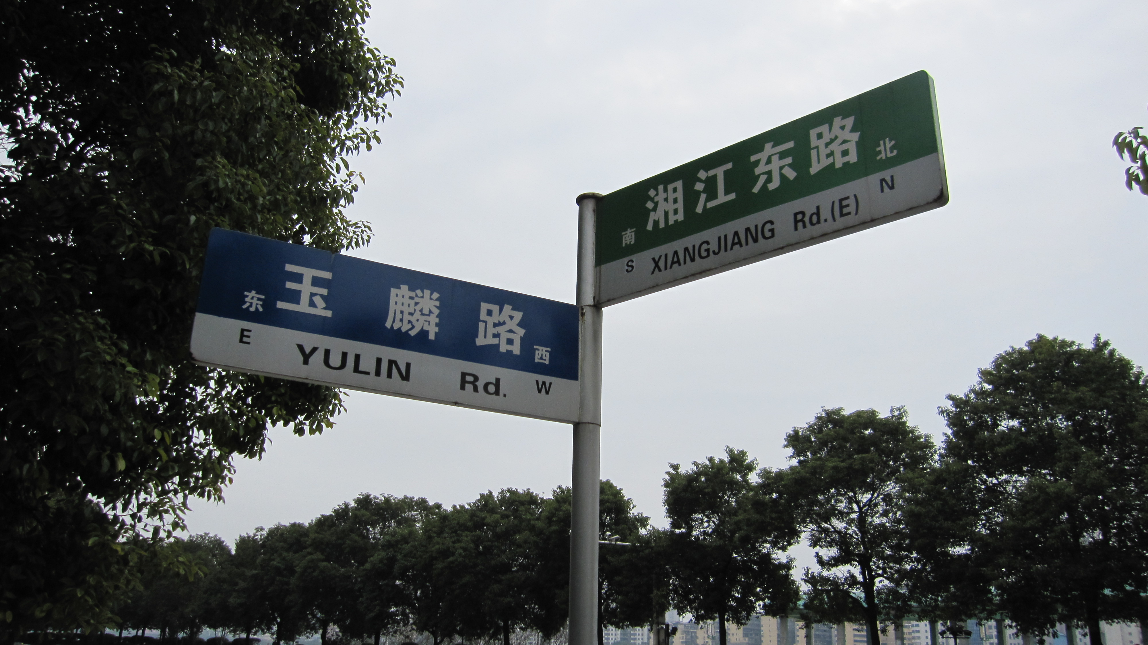 中文（中国大陆）: 以彭玉麟命名的路